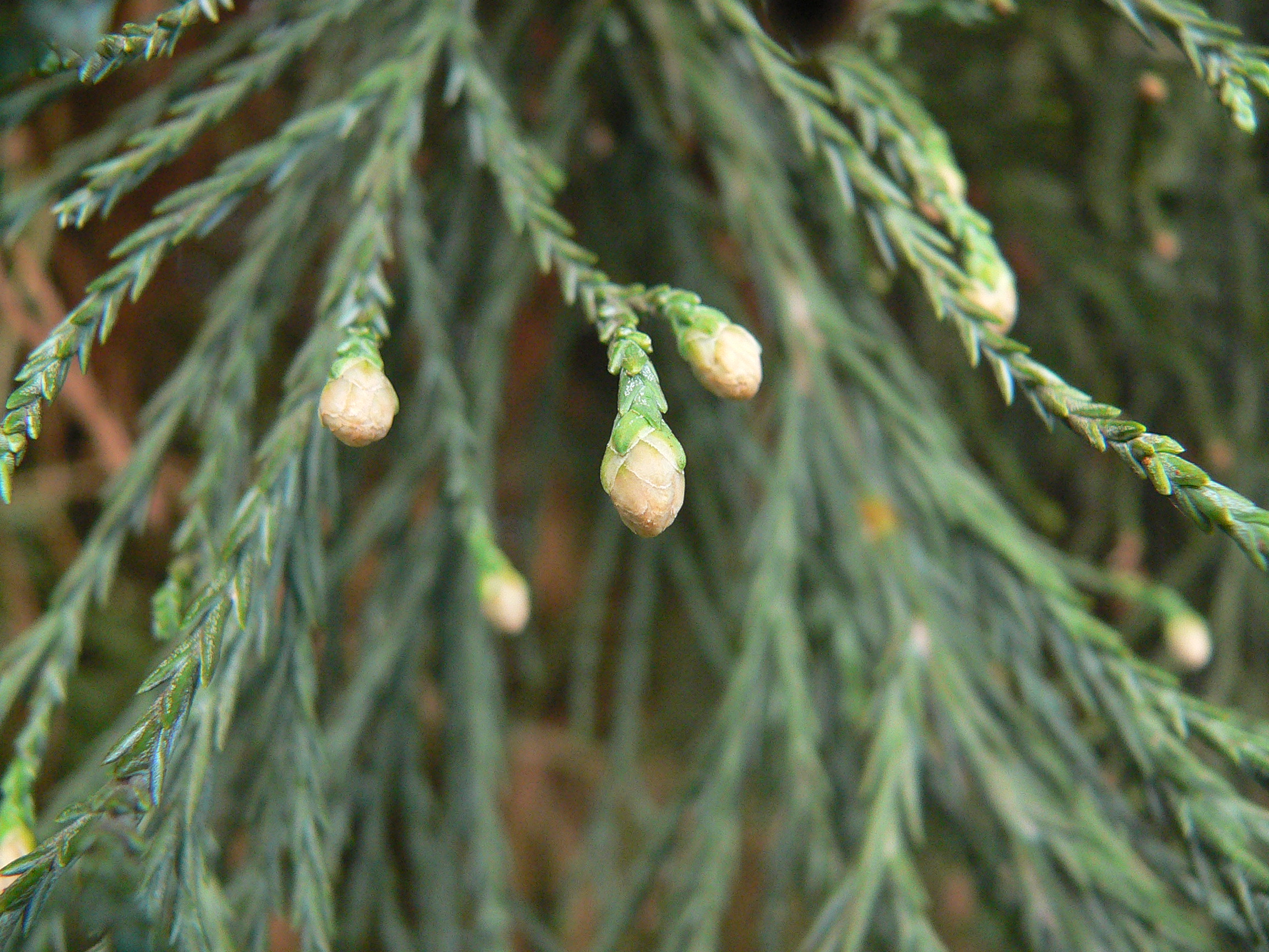 unopened pollen (male) cones of sequoiadendron giganteum, Portland, Oregon USA